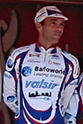 David Plaza. Team Barloworld-Valsir, Euskal Bizikleta 2005